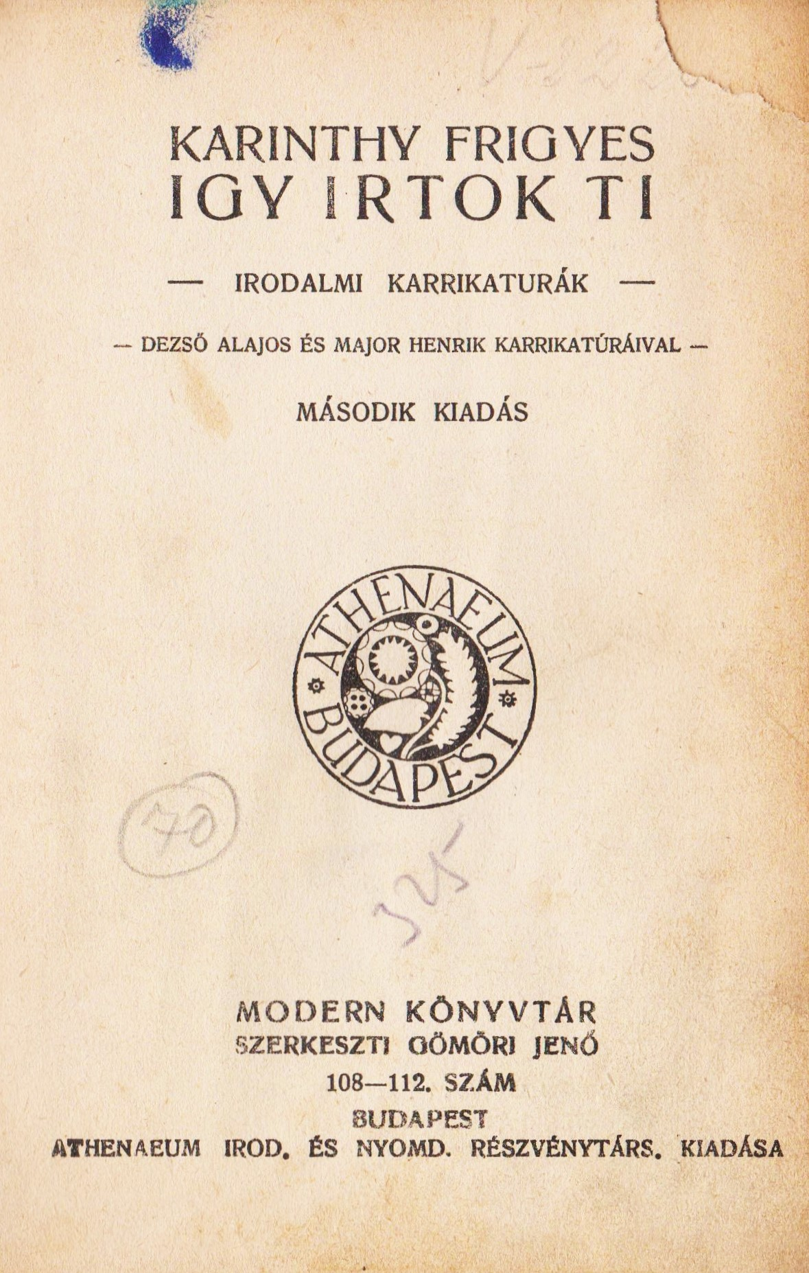 Karinthy Frigyes: Így írtok ti, 1910-es évek